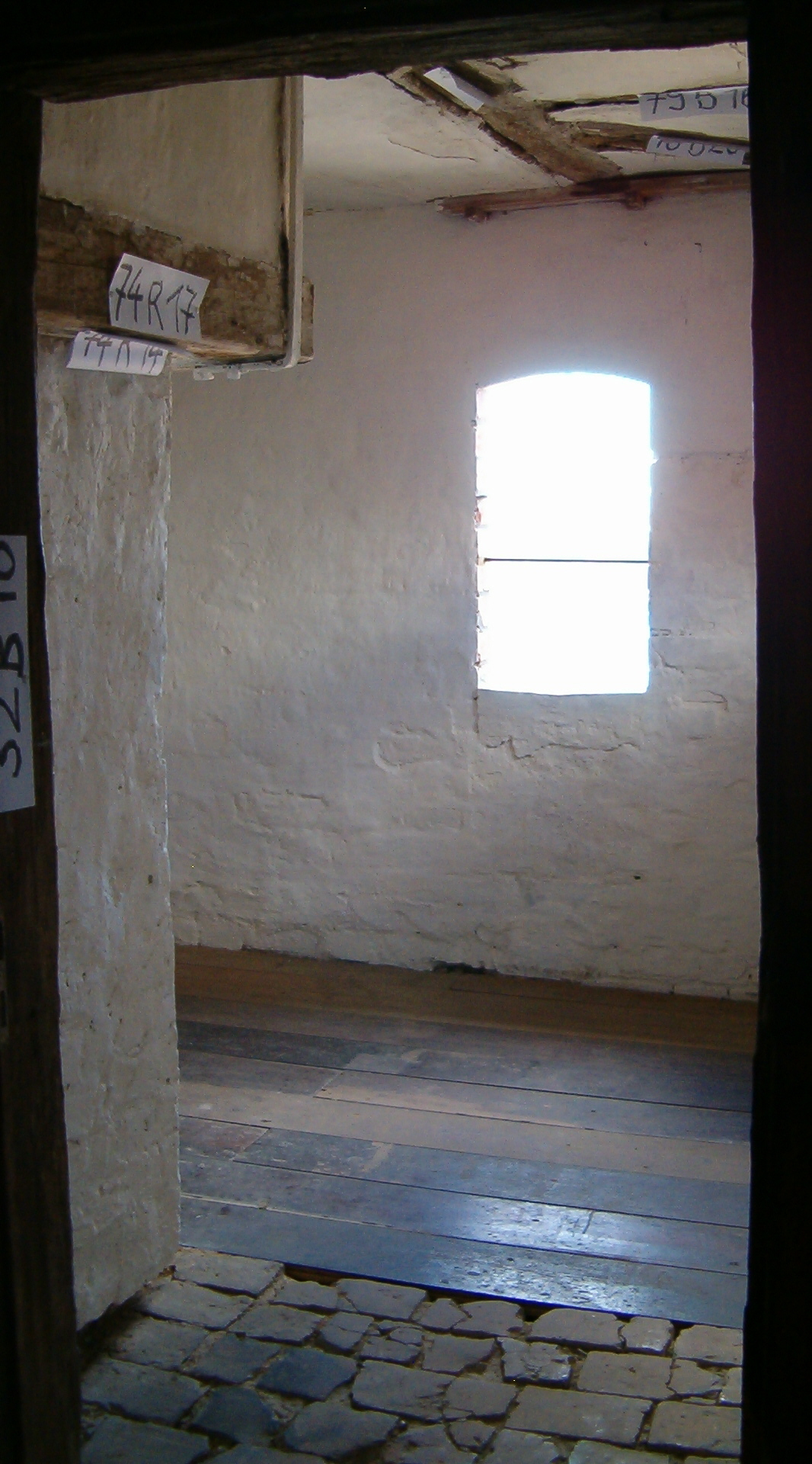 Türmerwohnung Marienkirche Rostock